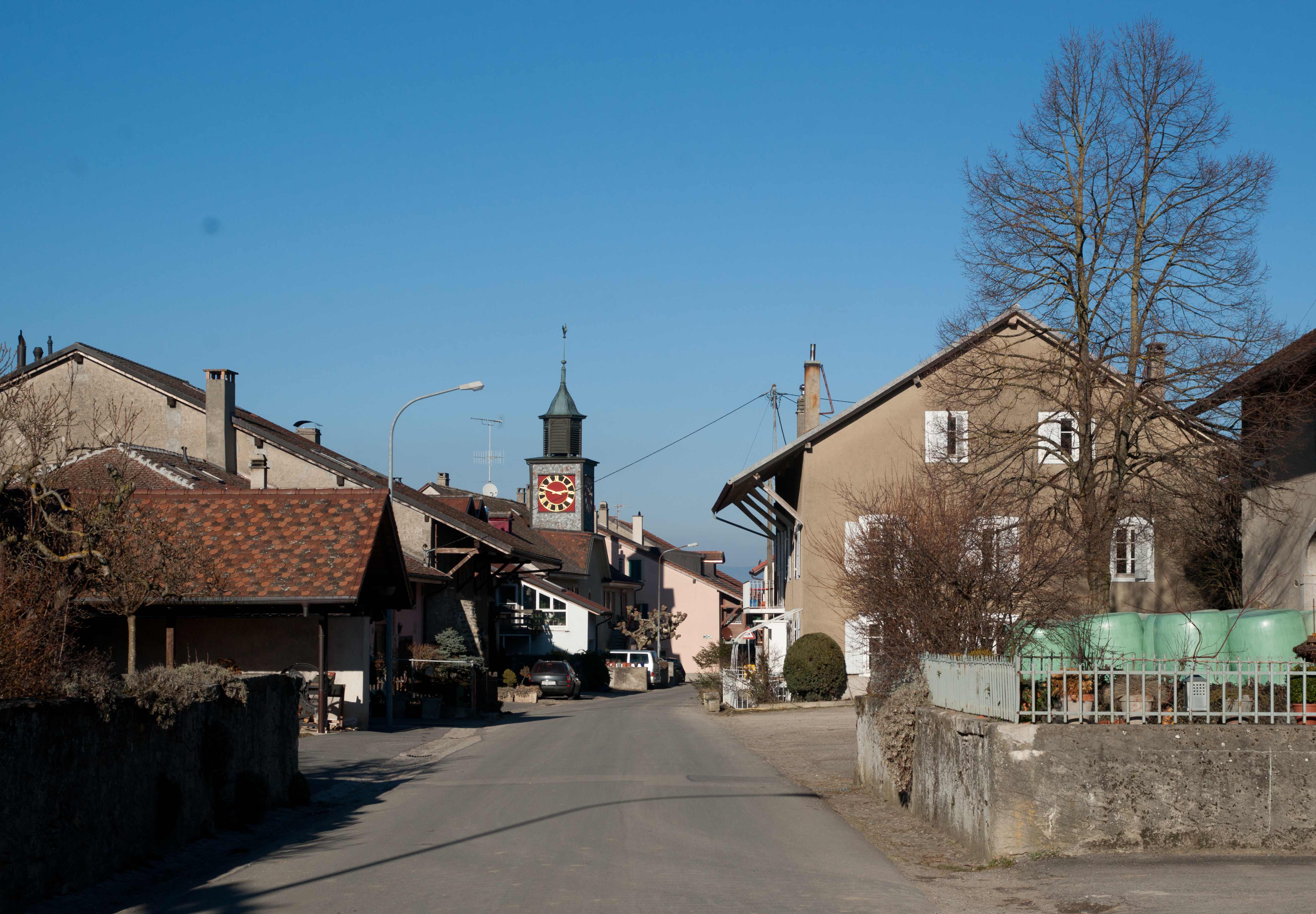 Dizy, canton de Vaud, Suisse.